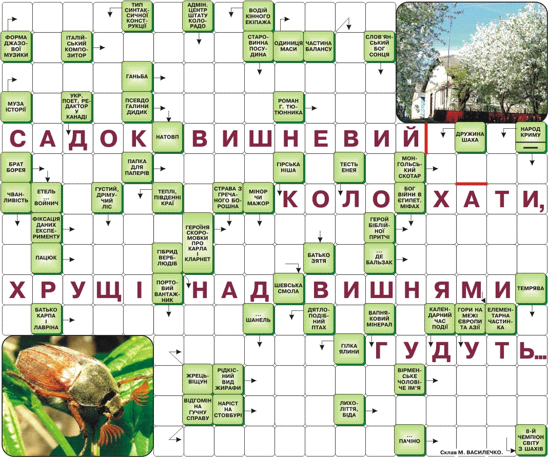 Скандинавський кросворд Миколи Василечка «Садок вишневий коло хати...». «Вільне життя плюс», № 35 від 12 травня 2010 року.